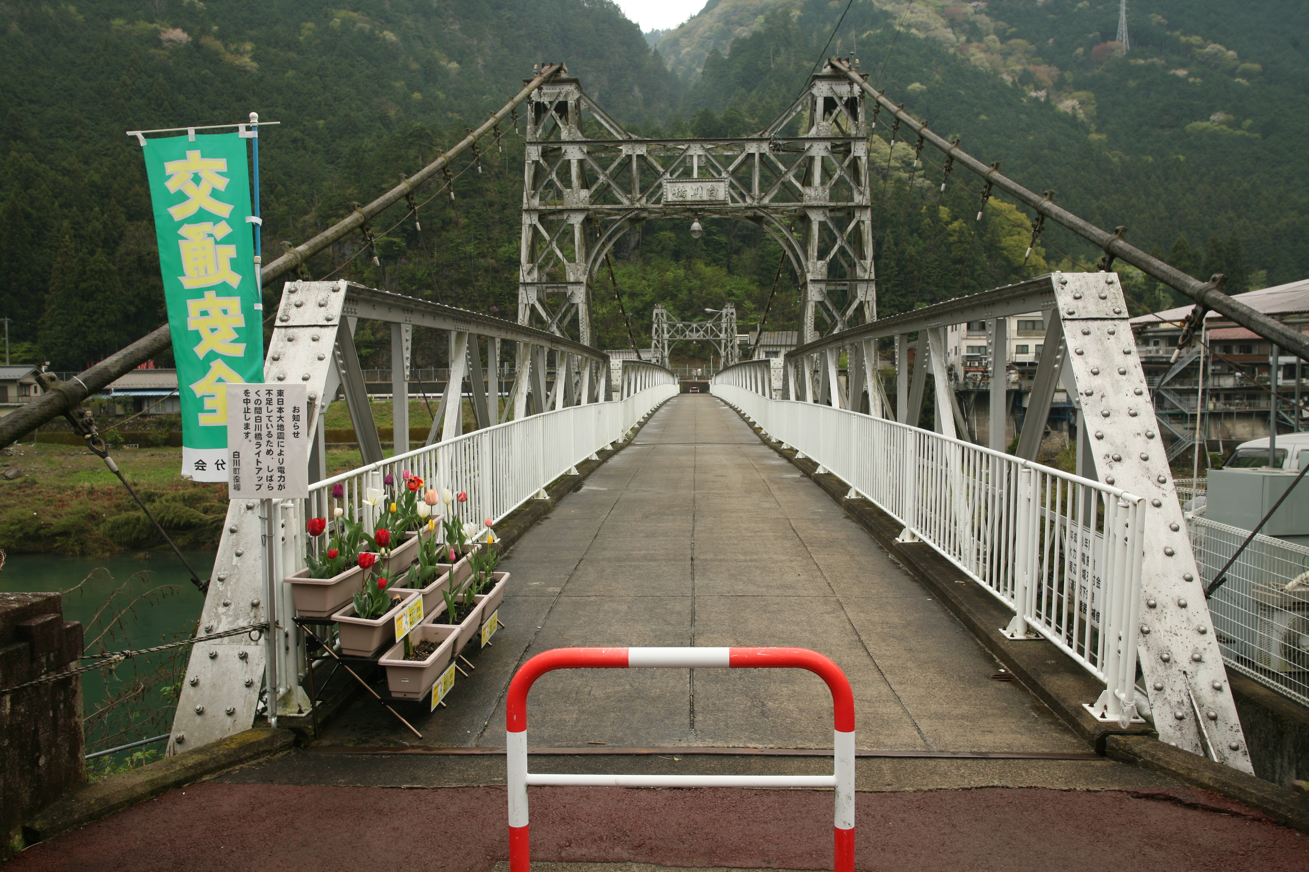 白川橋。岐阜県白川町。